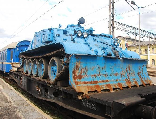 Czołg kolejowy z małym dźwigiem wchodzący w skład pociągu ratunkowego.